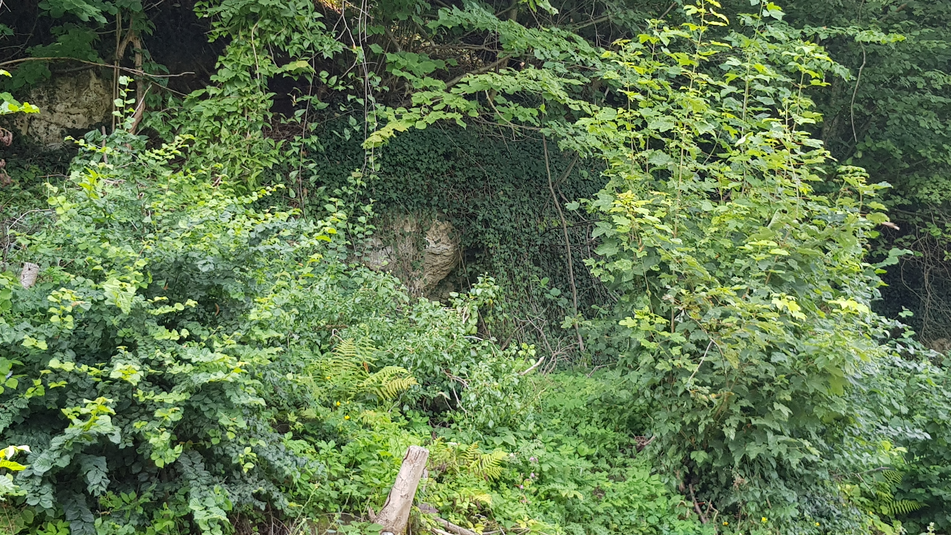 Ravensgroeve I, Geulhem, Nederland